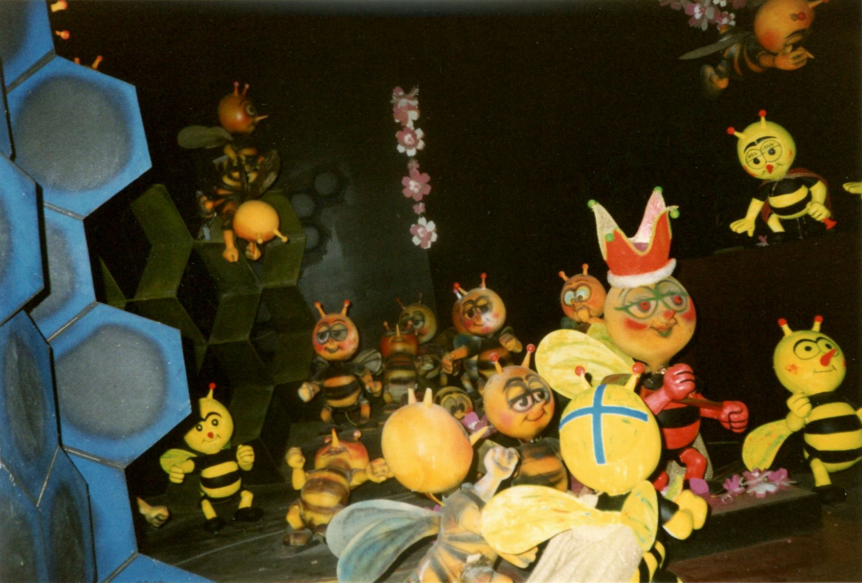 MeliparkApirama